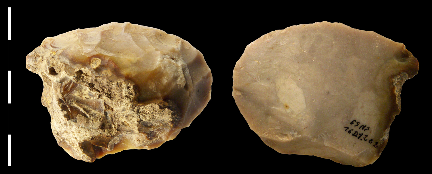 racloir en silex provenant du site moustérien de la Grotte du Noisetier (Hautes-Pyrénées, France) - cliché personnel V. Mourre flint side-scraper from mousterian site of Grotte du Noisetier (Hautes-Pyrénées, France - personnal shot V. Mourre